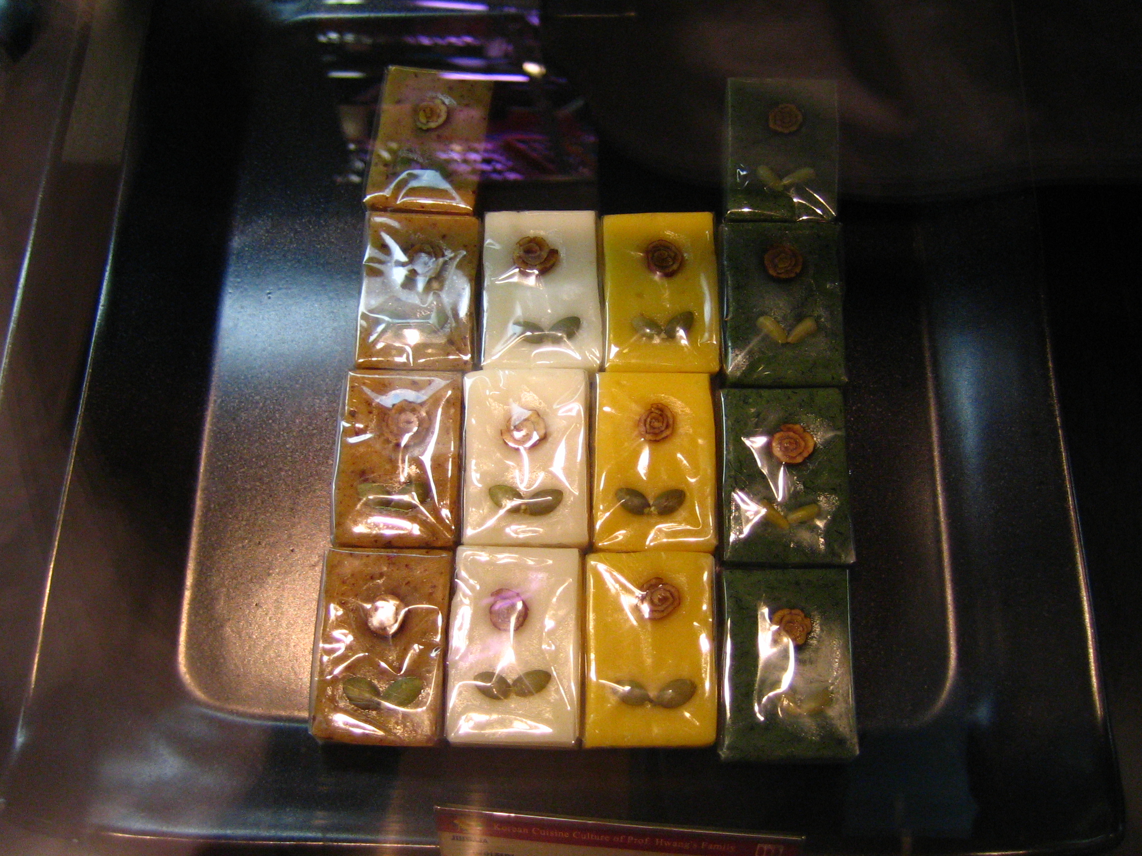 다양한 색상의 떡